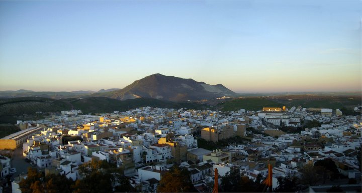 Vista de la Sierra de Esparteros desde la ciudad de Morón de la Frontera, Sevilla